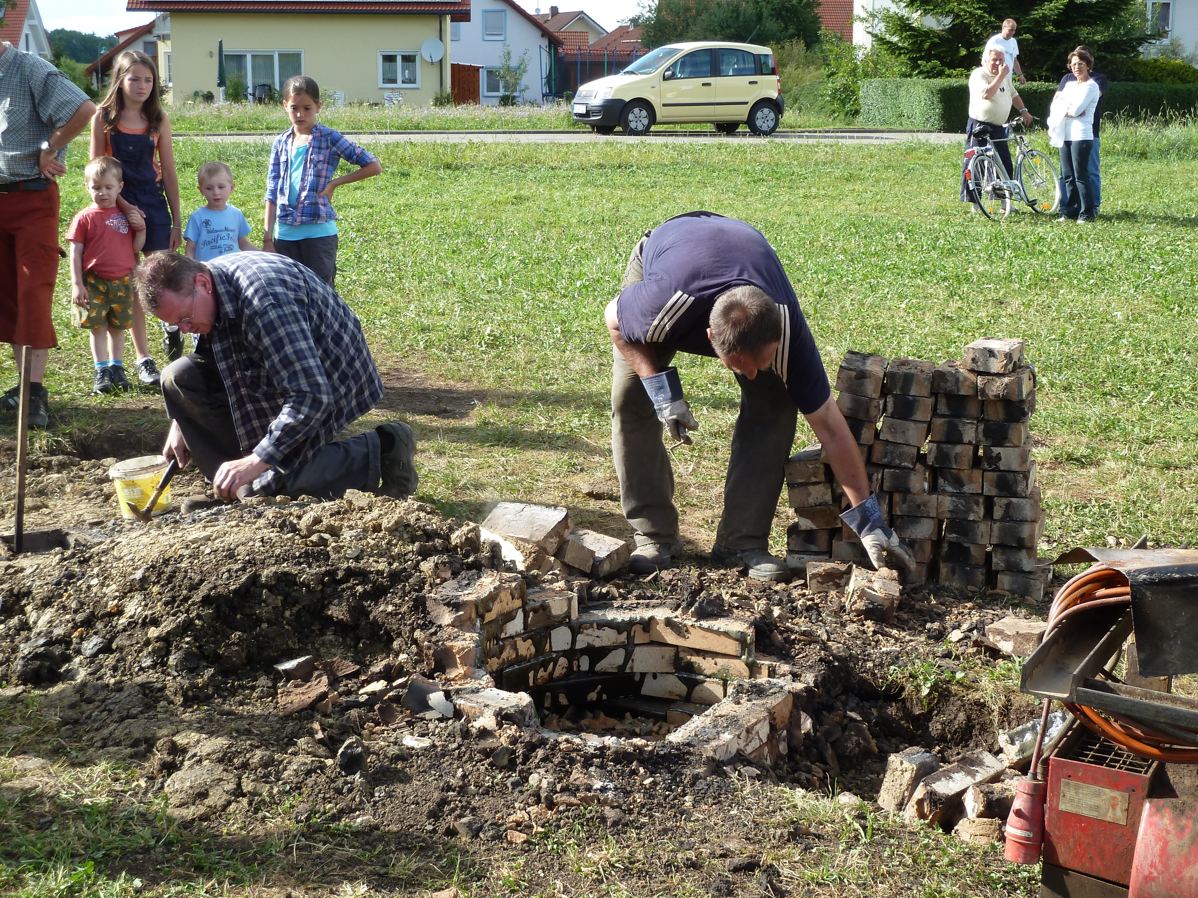 Glockenguss in Ewattingen mit Bruder Michael Reuter von der Abtei Maria Laach